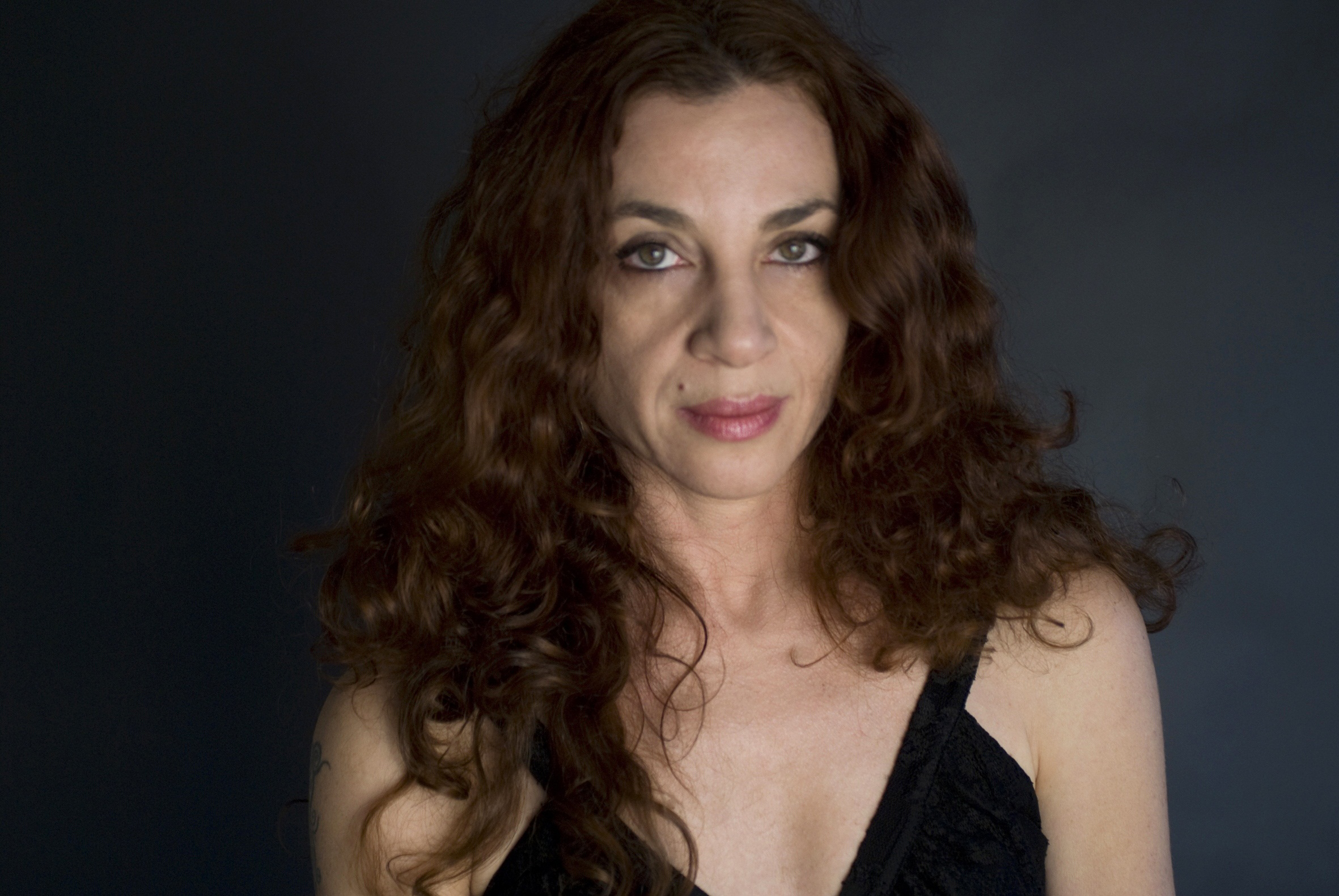 המשוררת טל ניצן